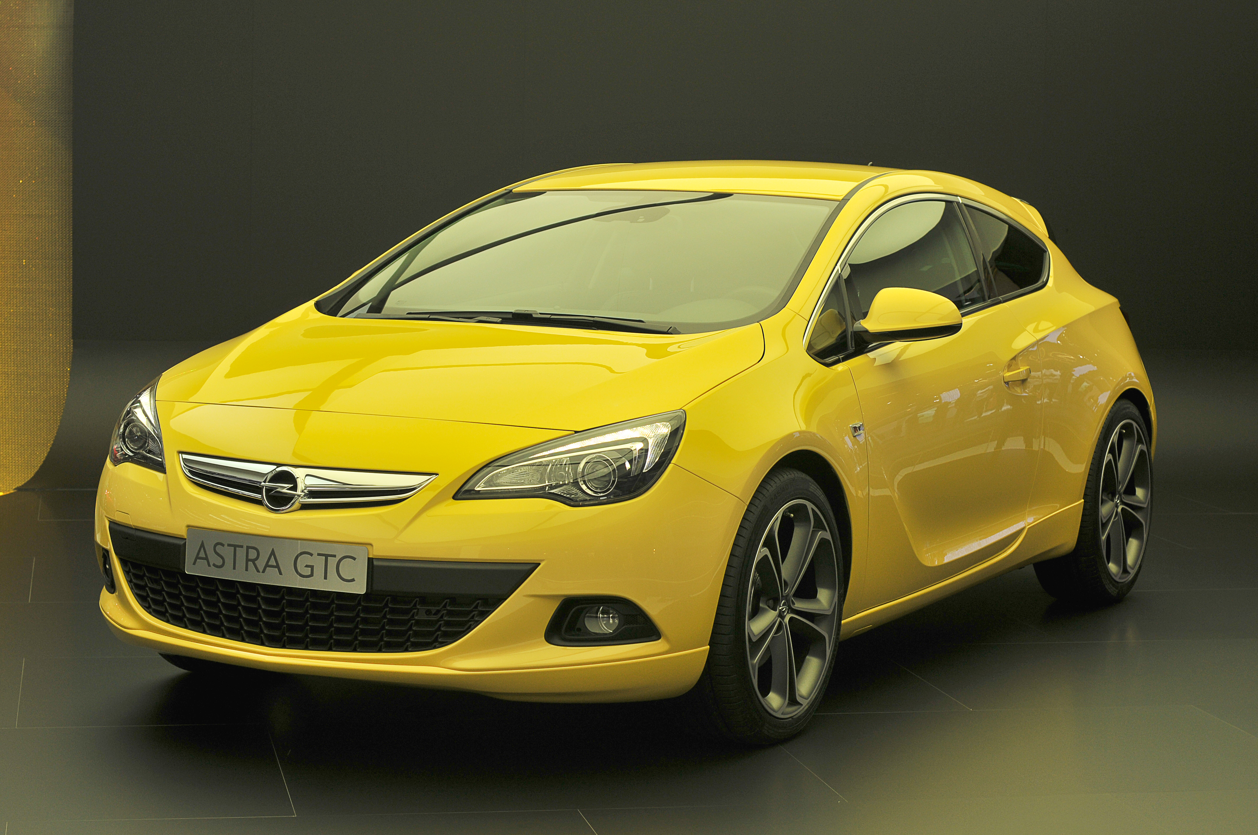 IAA 2011